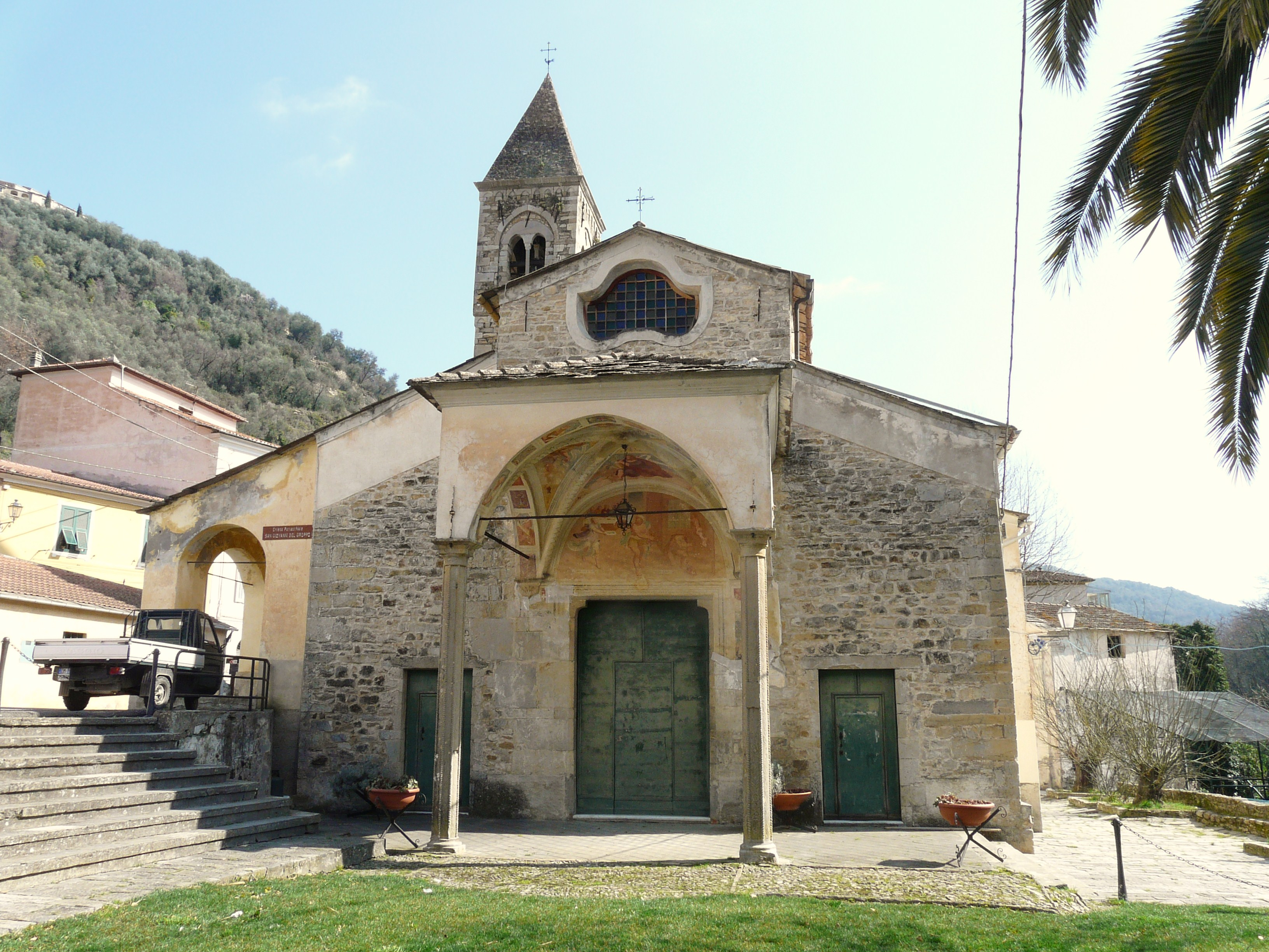 Chiesa di San Giovanni del Groppo, Prelà, Liguria, Italia